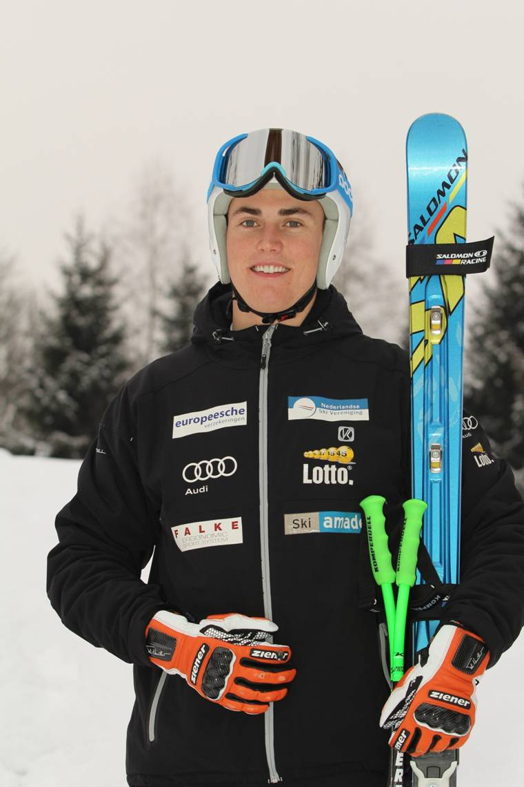 Marvin van Heek is een Nederlandse alpineskiër.